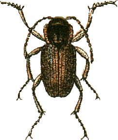 This file has been extracted from another file: Jacobs16.jpg